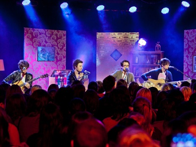 Panic at the Disco live